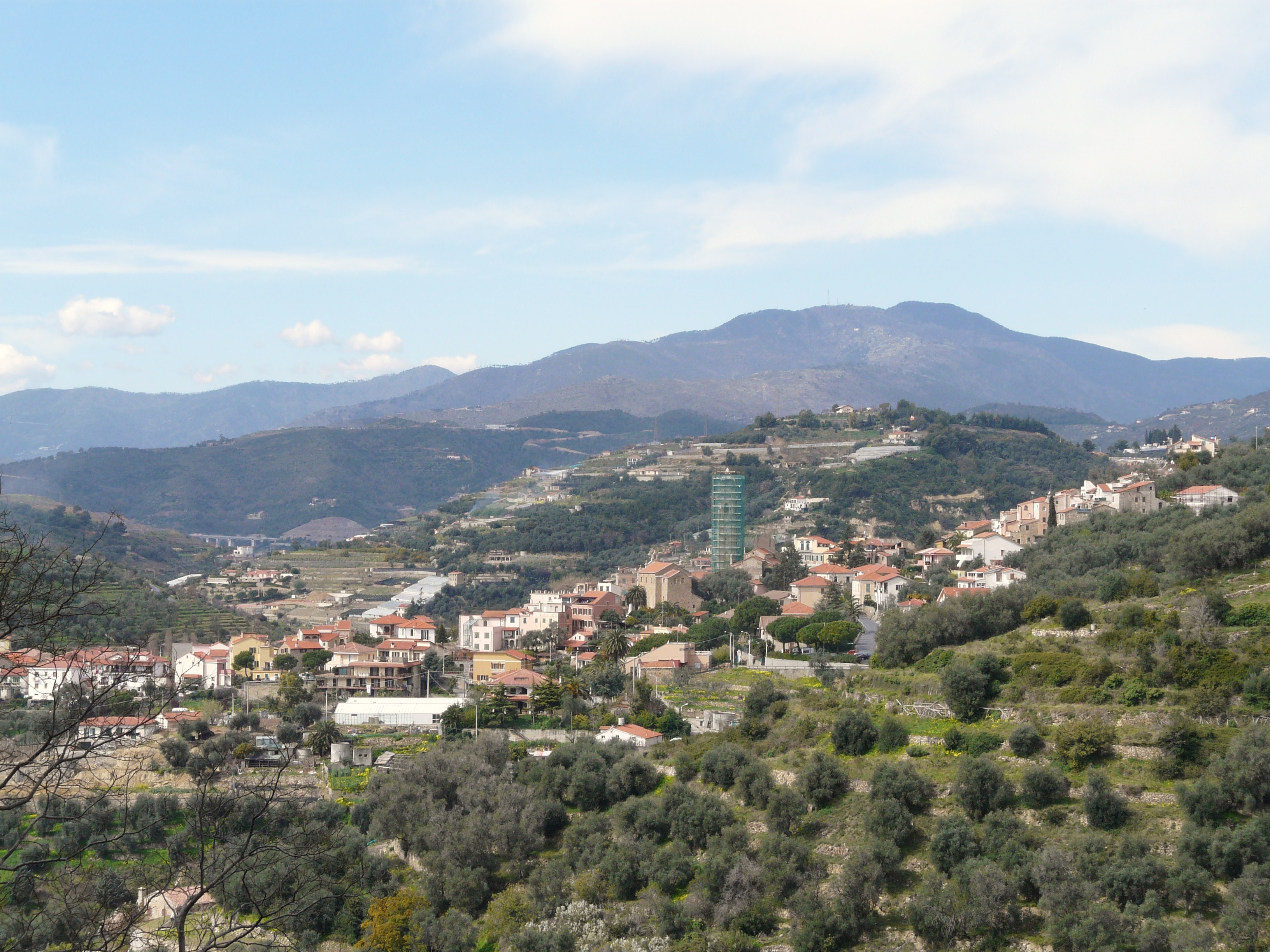 Pompeiana, Liguria, Italia